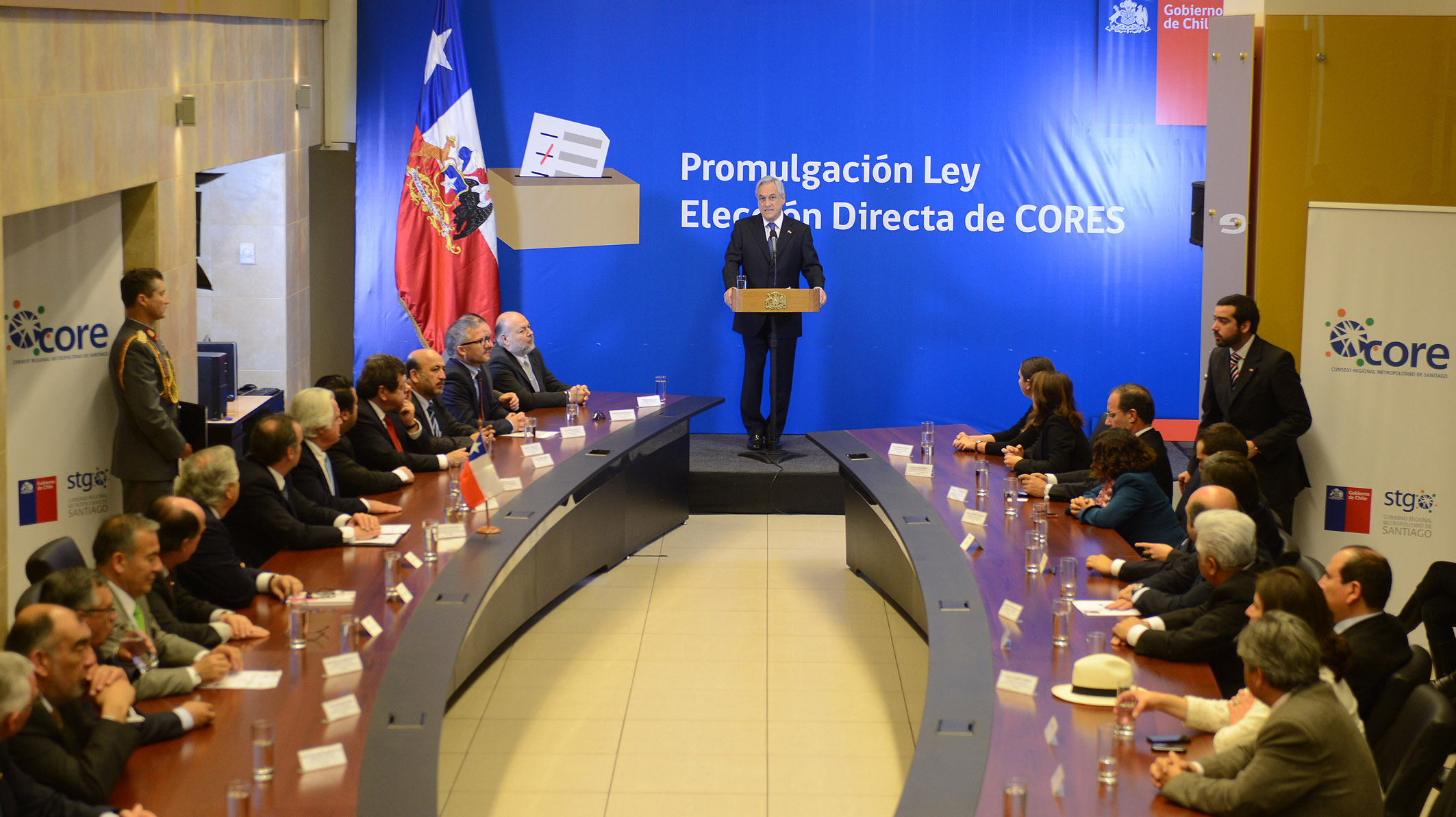 Promulgación Ley de elección de Cores.